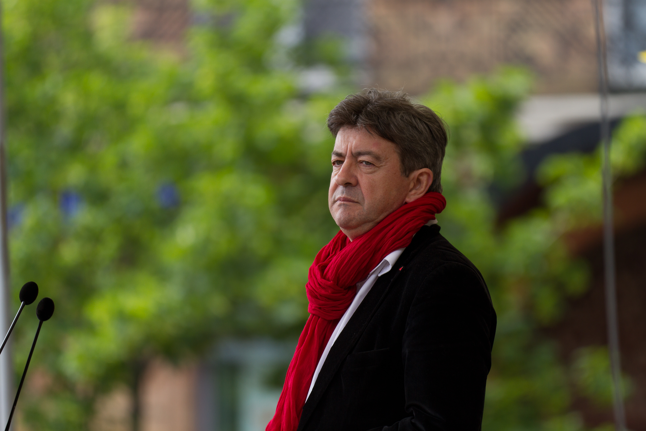 Marche pour une sixième République du Front de Gauche, Toulouse, allées Jean-Jaurès